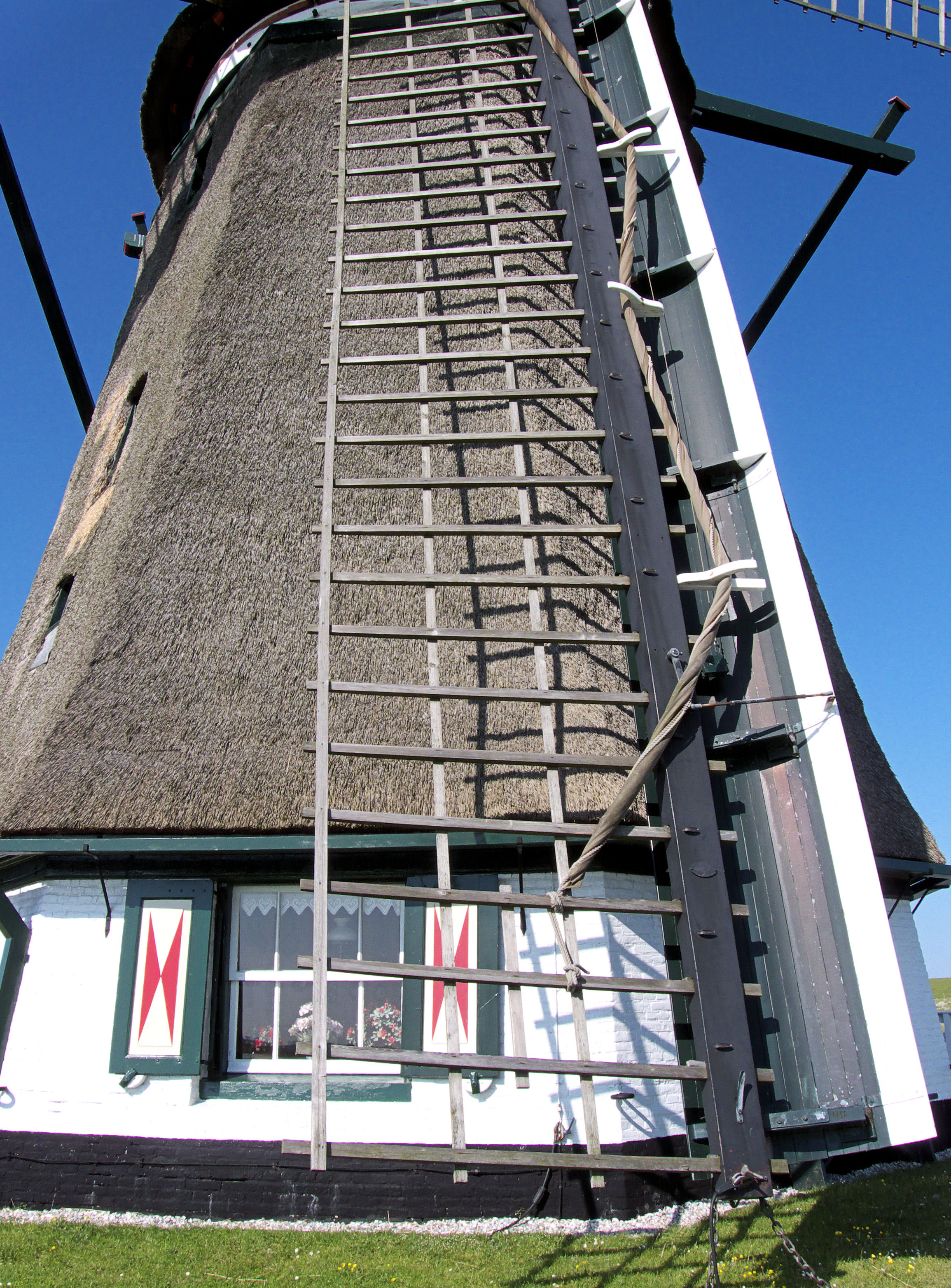 Molen Het Noorden, Texel, wiek